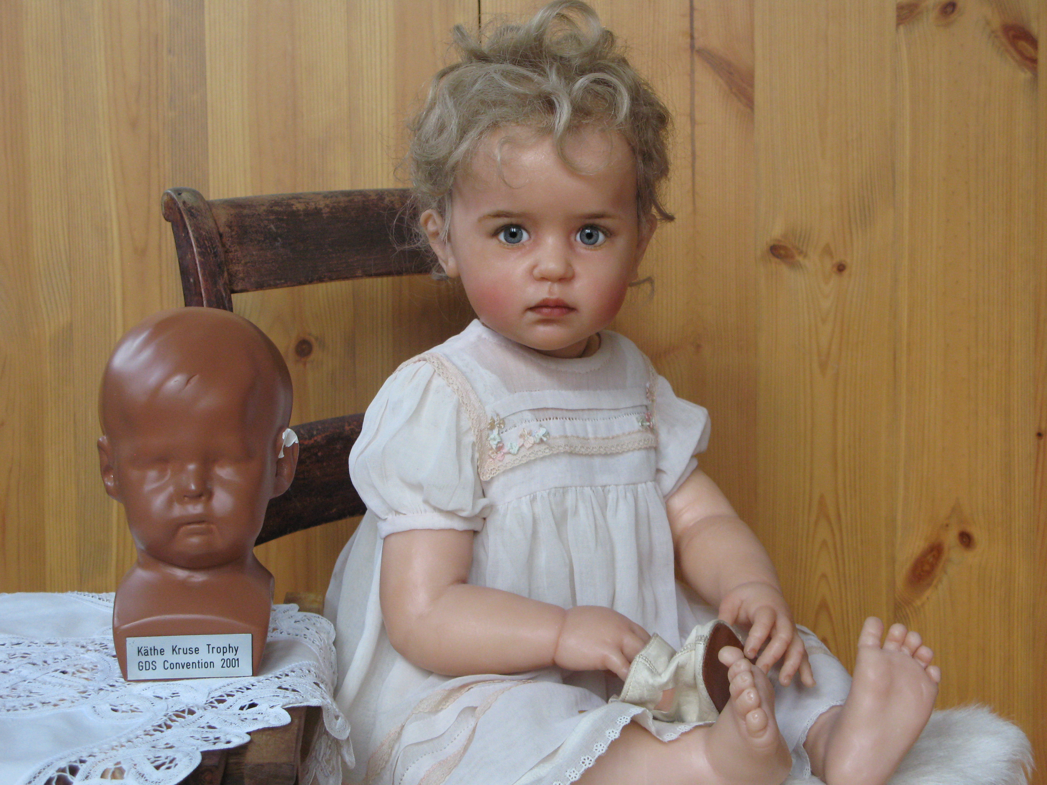 Cernit-dukke designet og modellert av den norske dukkekunstneren Sissel Bjørstad Skille. Dukken vant Käthe Kruse-prisen på Global Doll Society Convention i København 2001